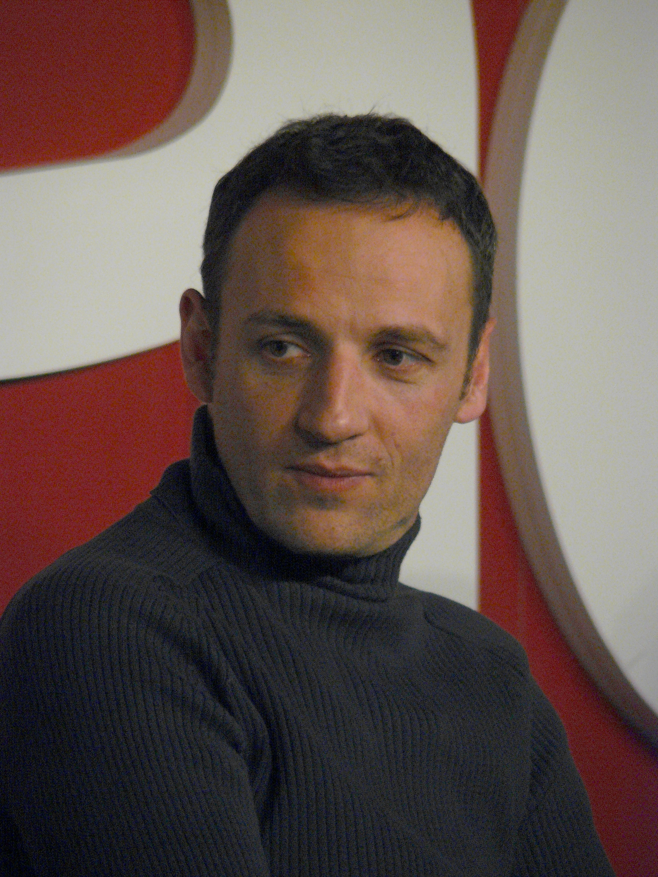 François Bégaudeau lors d'une présentation du film Entre les murs le 25 mars 2009 à la FNAC Montparnasse (Paris).